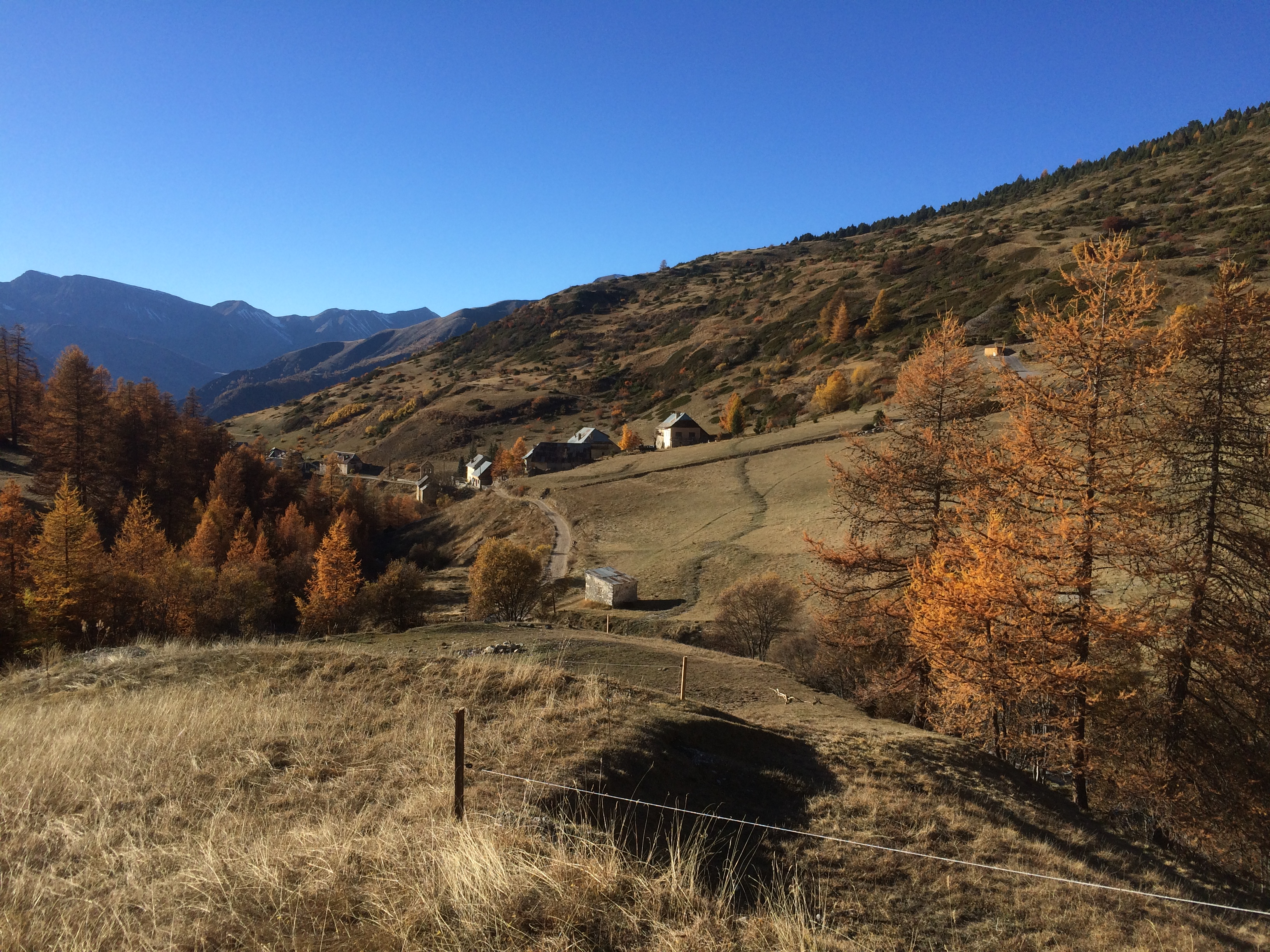 La bute du premier plan portait anciennement au XIXs la plus haute maison du quartier disparu “Pontey” (5 maisons et un moulin en 1754). En haut à droite entre les mélèzes le nouveau chateau-d'eau, bassin d'eau potable avec traitement UV (il est aussi la réserve incendie). La petite cabane au centre fut construite (probablement vers 1900) pour abriter un binôme de douaniers contrôlant l'arrivée d'Italie.